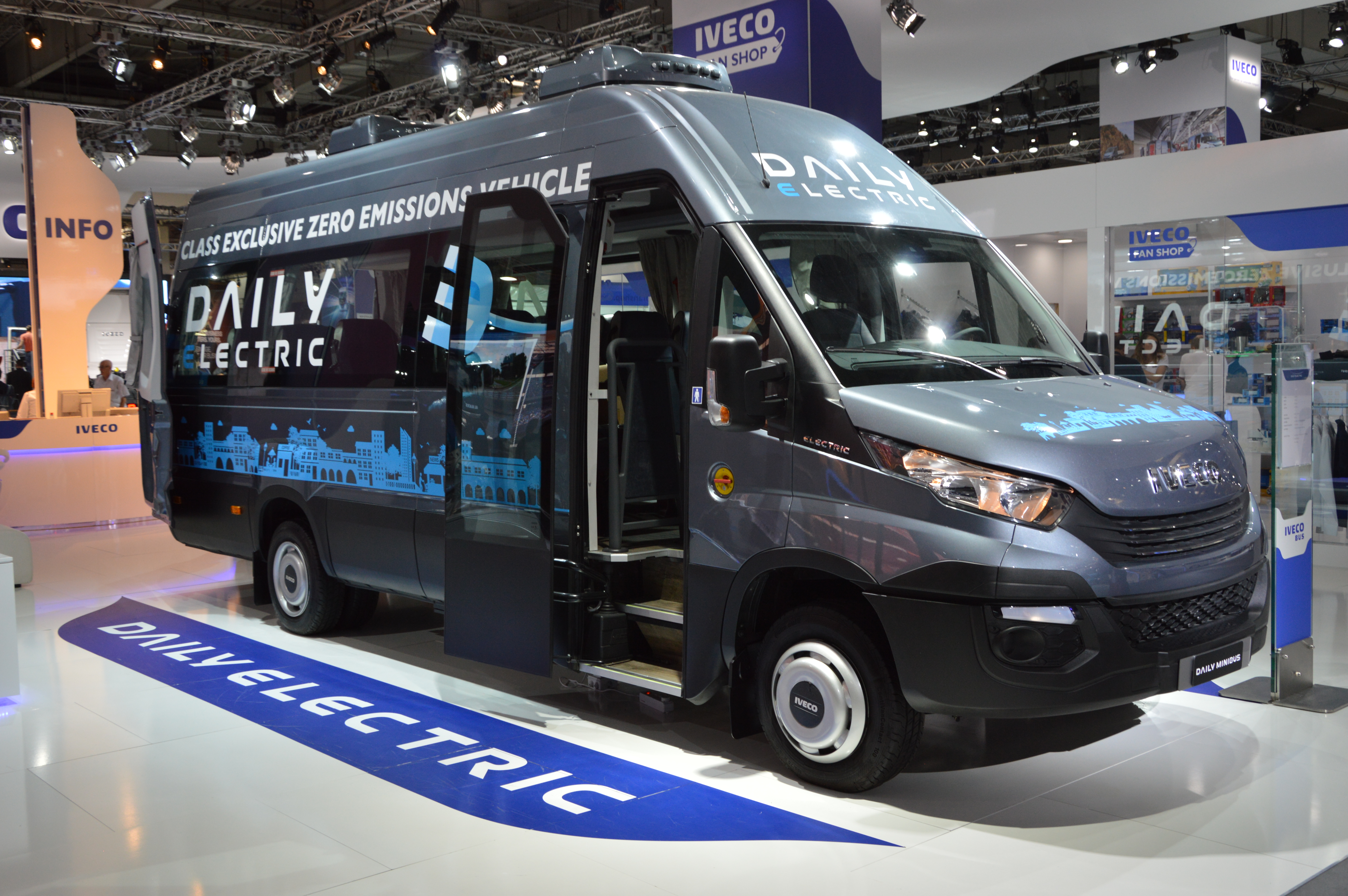 Iveco Daily Electric Kleinbus 16 Sitzplätze. Erweiterte Reichweite bis zu 280 km. 2 Stunden verkürzter Schnelllademodus. Serie Iveco Daily Blue Power war 2018 Van of the Year.